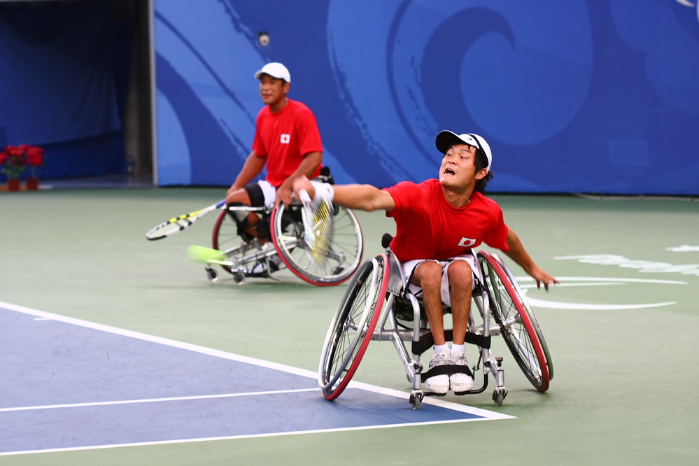 2008北京残奥会的轮椅网球赛之二--男子双打季军争夺